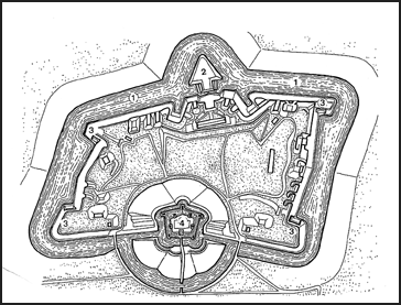 Plattegrond van Fort Rijnauwen. 1= fortgracht. 2= caponniére. 3= flankbatterij. 4= reduit. oude prent zonder auteursrechten